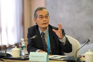 開花国際ホテル「国際会議場」（IUCNの会議）